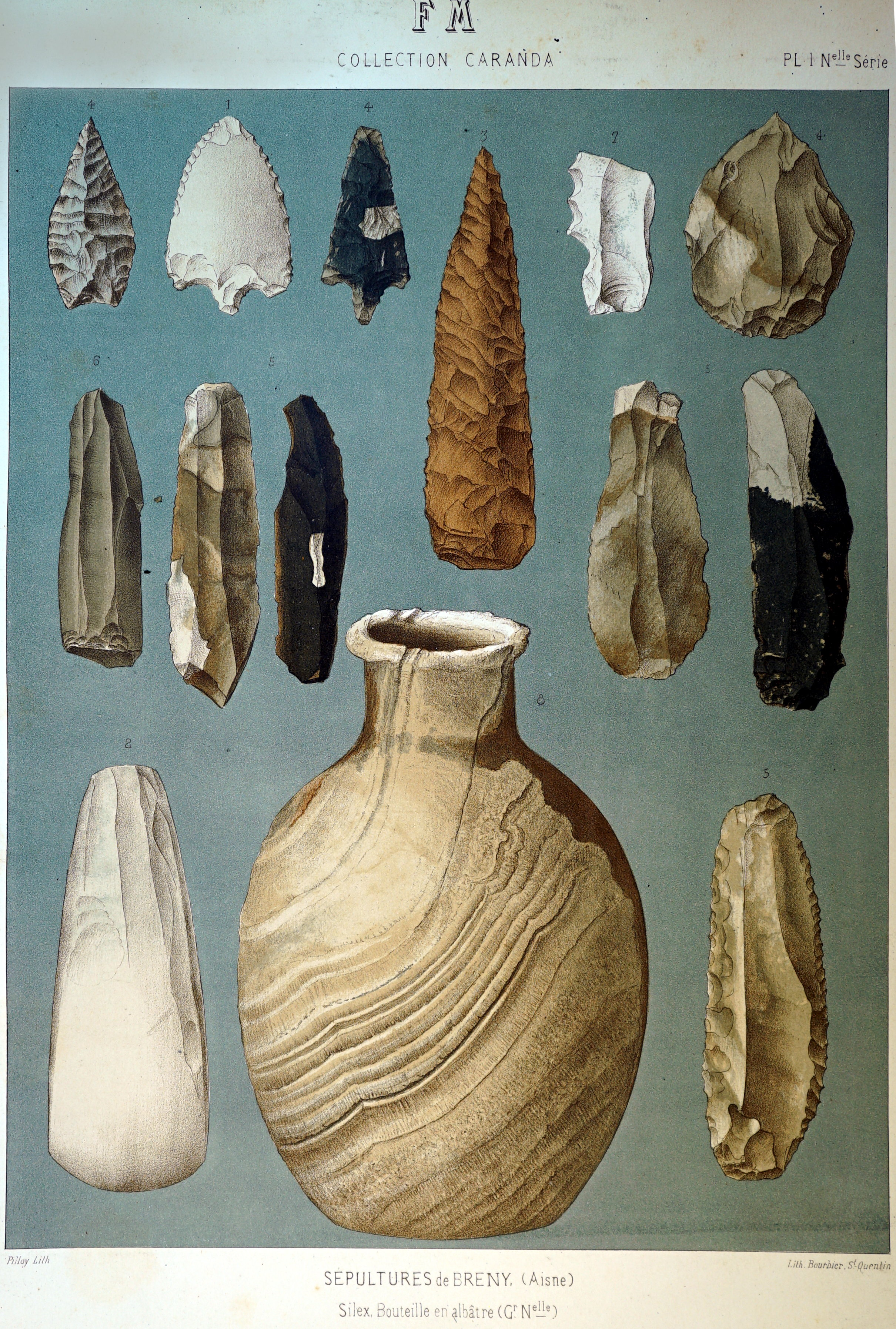 dessin de Pilloy pour les fouilles de Moreua.